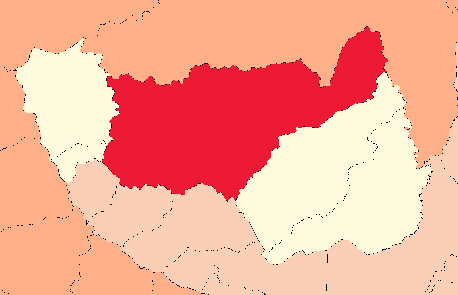 Área del distrito de Cholón en la provincia de Marañón.